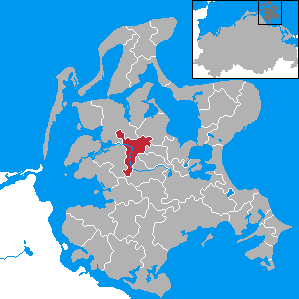 Kluis, Landkreis Rügen, Mecklenburg-Vorpommern